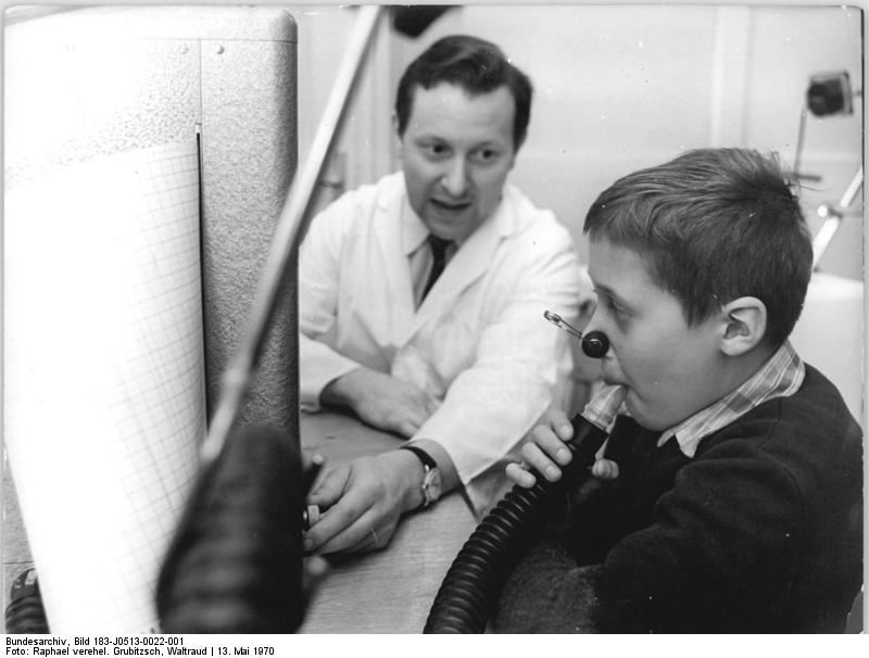 Leipzig, Universitätskrankenhaus, Kinderklinik Zentralbild Raphael 13.5.70 Leipzig: Vorbildliche Betreuung in der Kinderklinik- In einer speziellen Abteilung der Kinderklinik der Leipziger Karl-Marx-Universität werden chronische Lungenerkrankungen behandelt und überwacht. Unser Foto zeigt Dr. Peter Winterstein mit dem 11jährigen Thomas bei der Kontrolle der spirographischen Werte. Diese ambulanten Kontrollen gehören zu den selbstverständlichen Leistungen der Klinik.